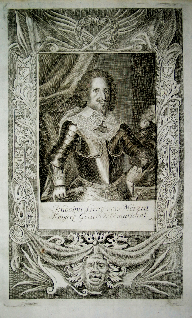 Rudolf Graf von Morzin: Rudolph Graff von Morzin, Kayserl. Gener. Feldmarschal